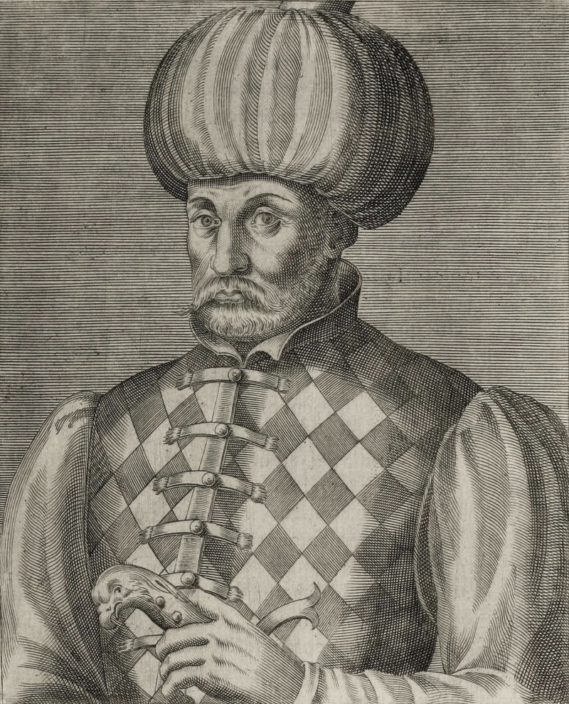 Изображение шейхзаде Мустафы из книги французского путешественника «Les vrais pourtraits et vies des hommes illustres...» (1584)